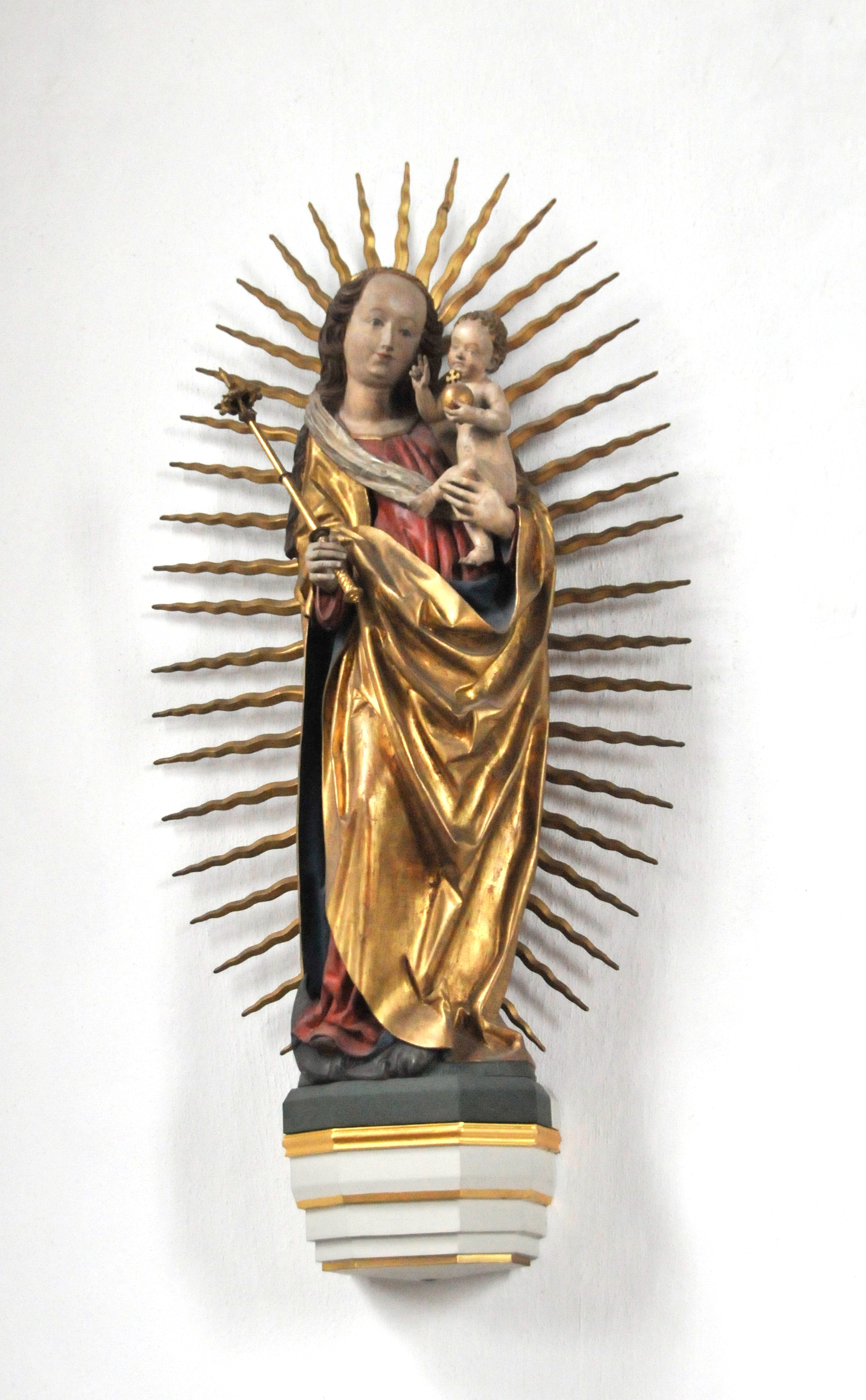 Wolfmannshausen, Kirche